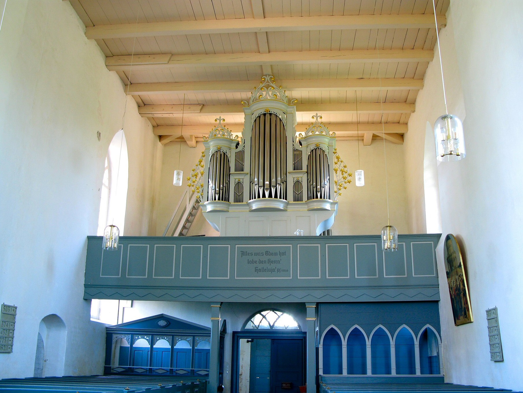 Orgel in Eggelingen, Landkreis Wittmund